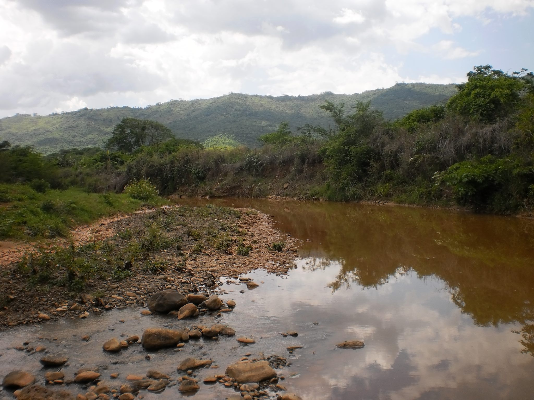 Rio Guanape